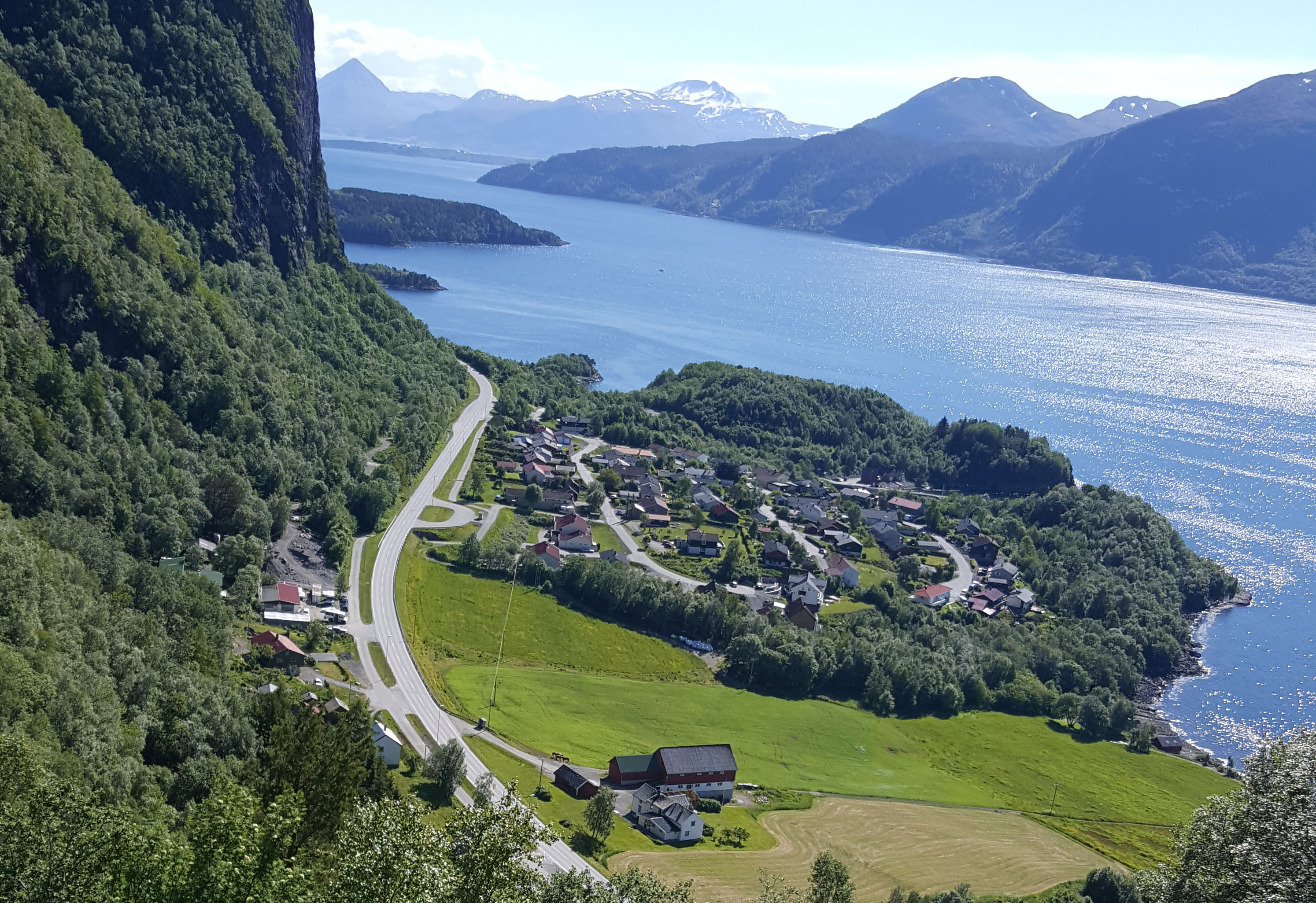 Eidskrem byggefelt sett fra stien opp mot Eidskremheia